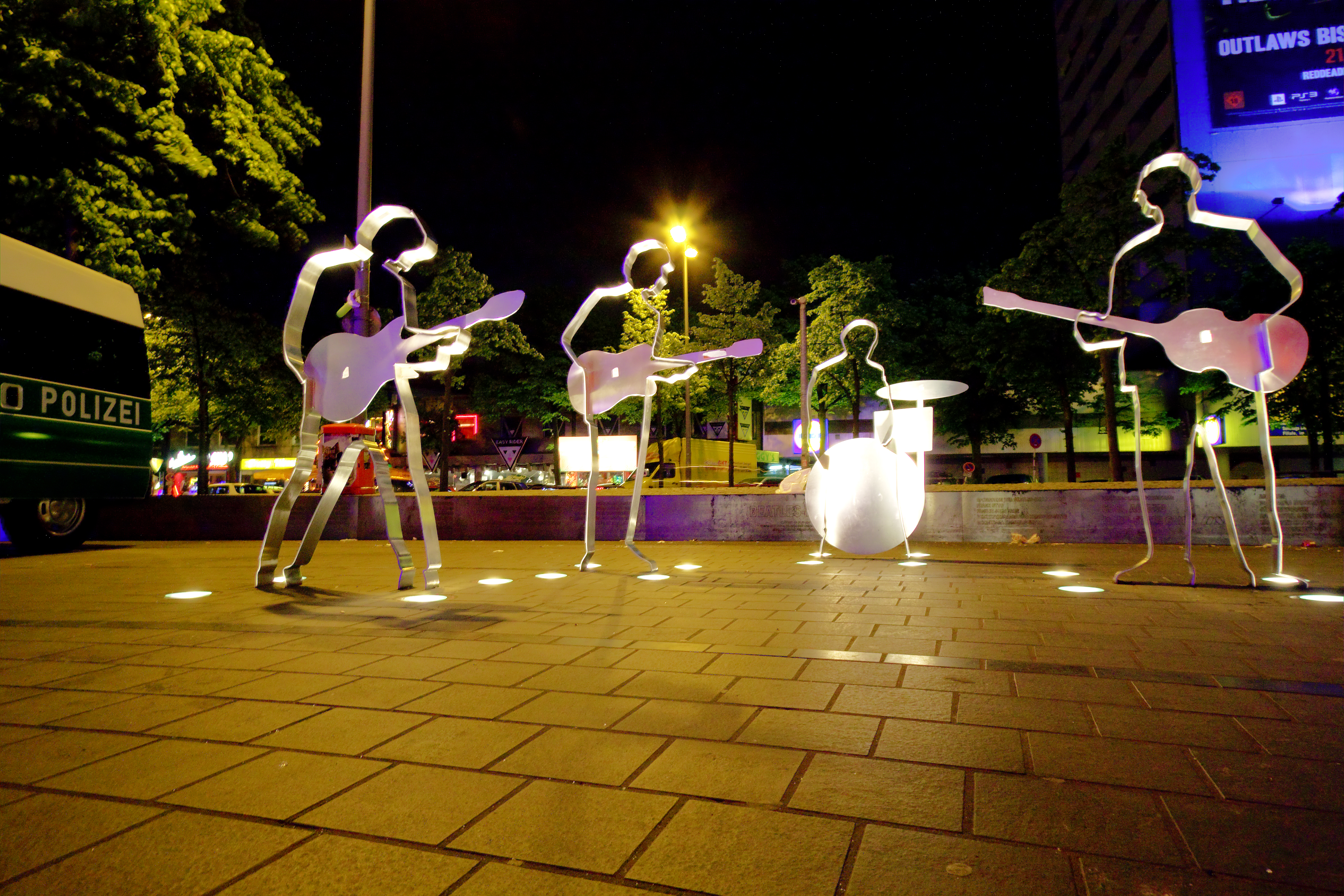 Beatles-Platz bei Nacht